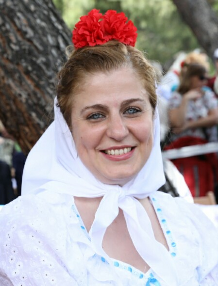 Hoy la alcaldesa de Madrid, Manuela Carmena, ha recorrido la Pradera y ha asistido a la Misa popular, con la que ha finalizado la jornada, que comenzó a primera hora con el izado de la bandera en la plaza de Colón y con la entrega de Medallas de Oro de la Ciudad.